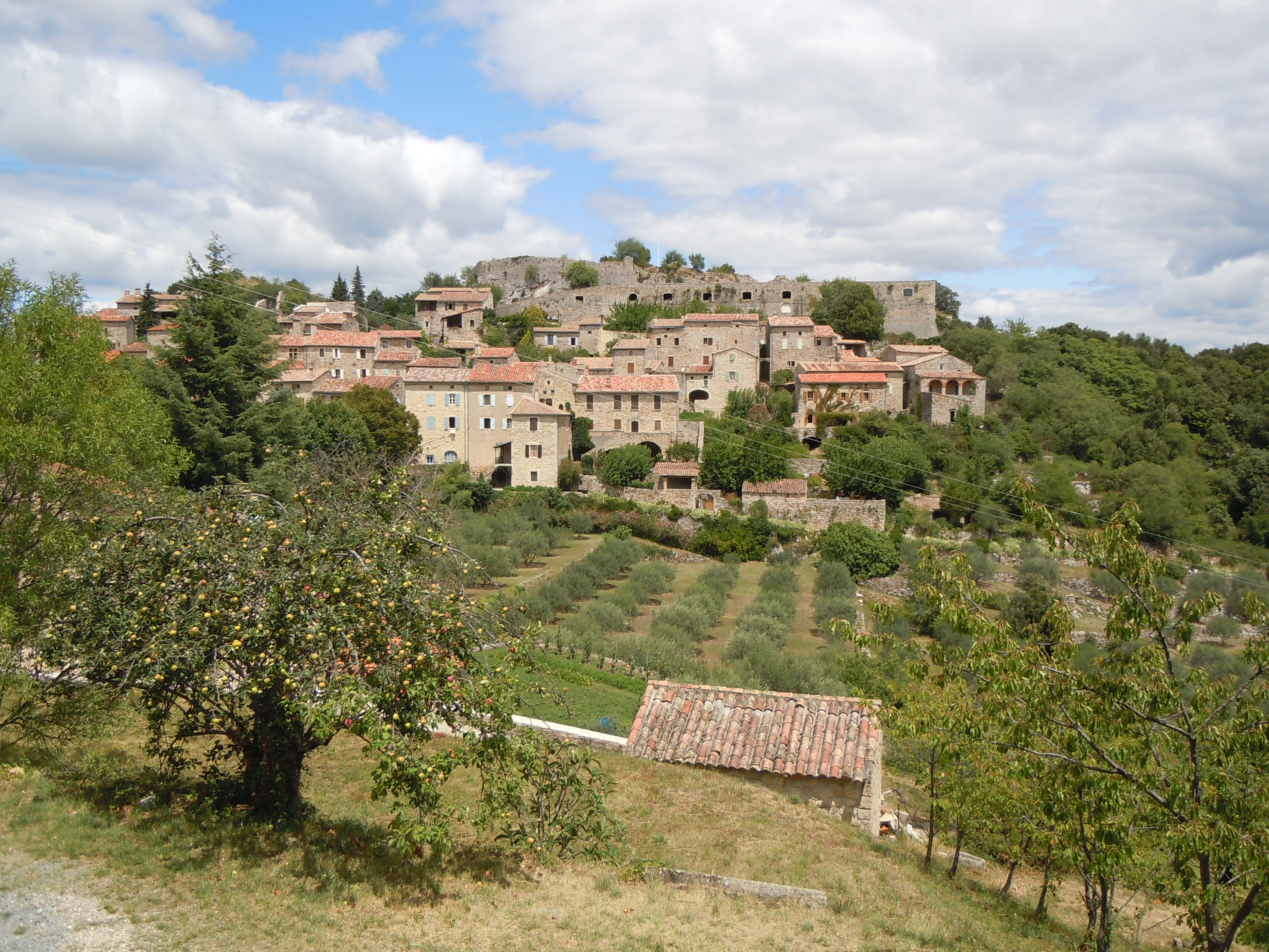 Site du Chateau de Banne en Ardèche - France